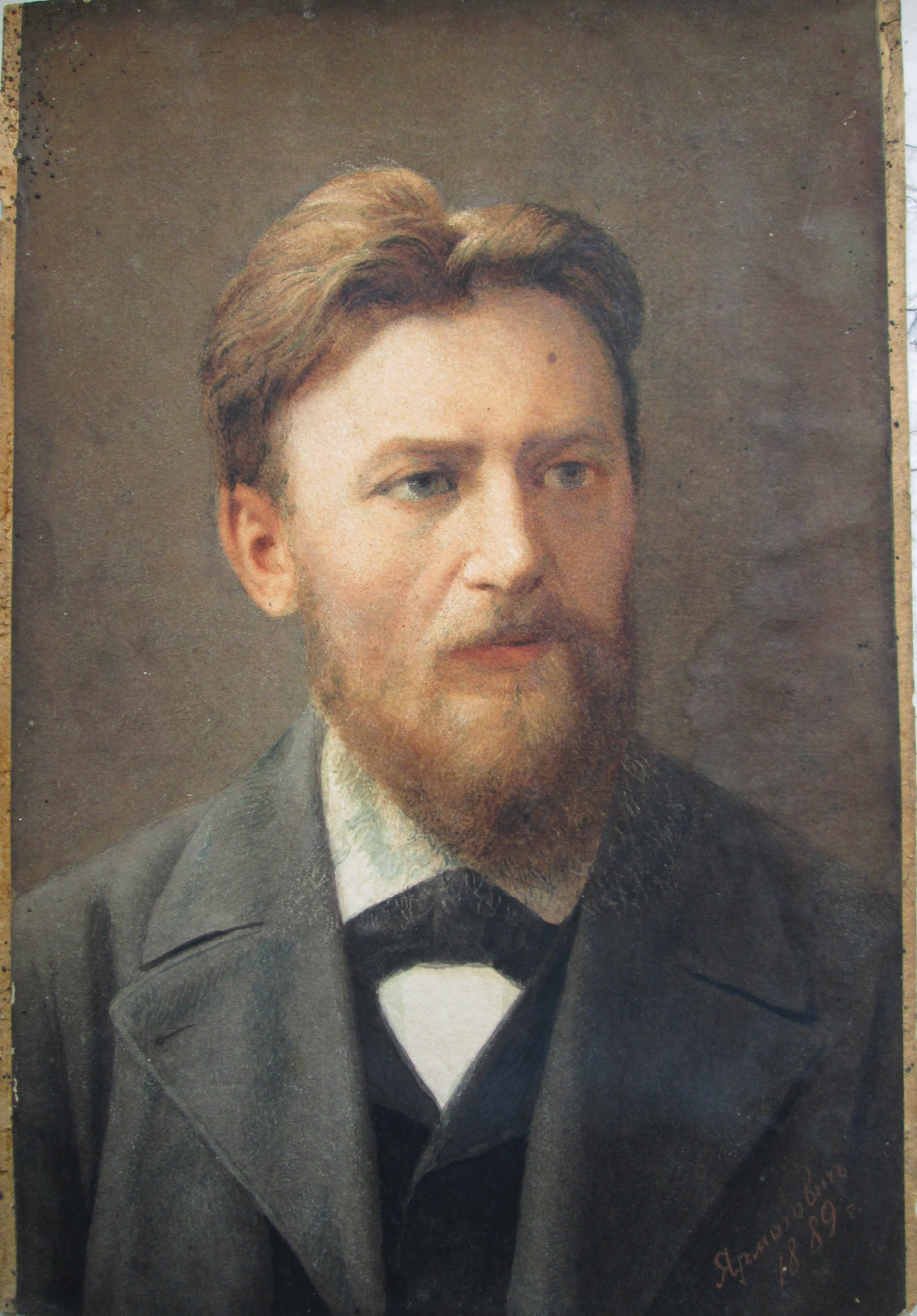 Ярмохович Портрет Андрієвського